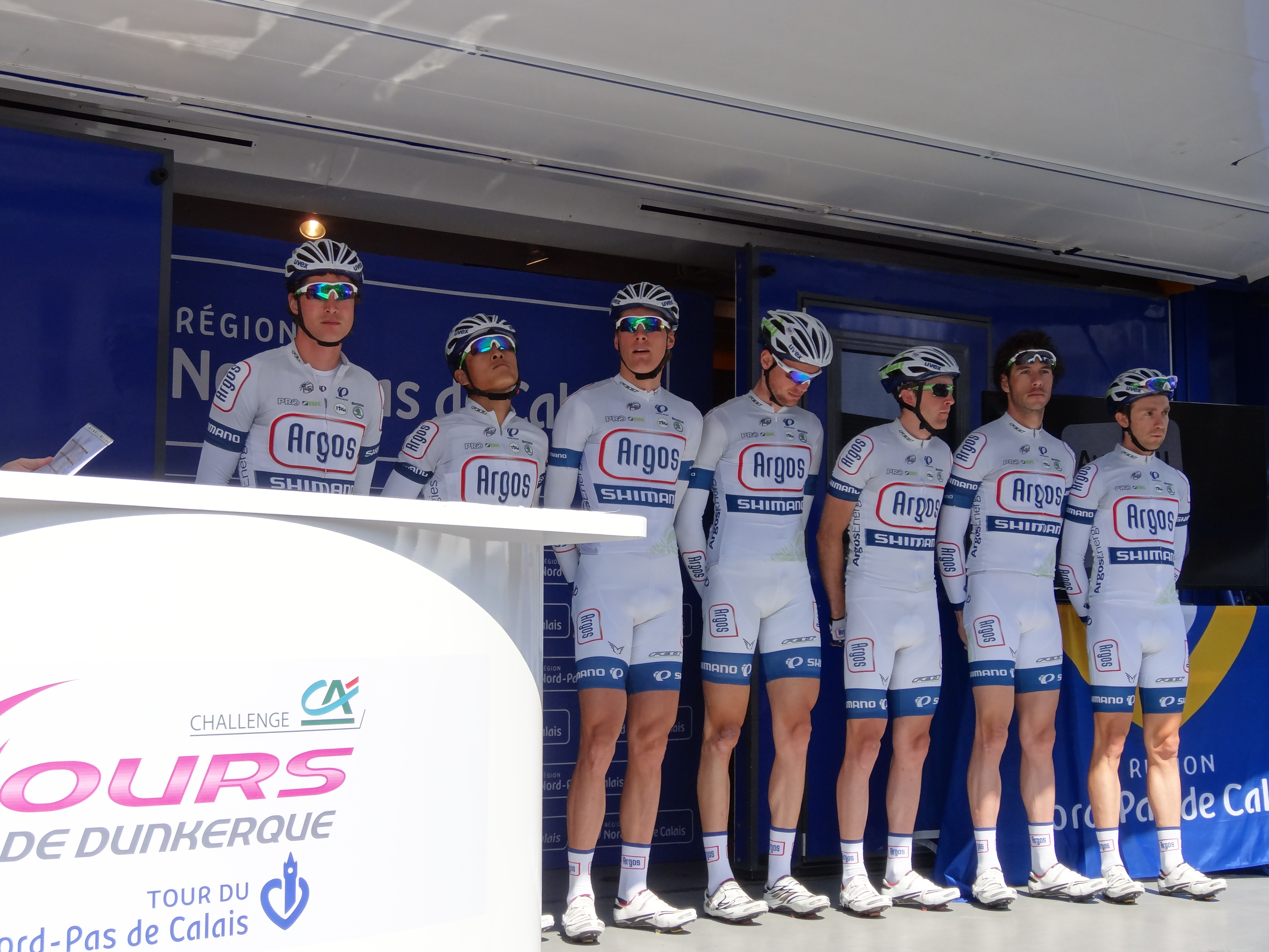 Reportage photographique réalisé le mercredi 1er mai 2013 au départ de la première étape de l'édition 2013 des Quatre jours de Dunkerque à Dunkerque, Nord, Nord-Pas-de-Calais, France. Le dossier photographique montre des véhicules de course exposés, la caravane publicitaire, la présentation des coureurs, et le départ. Depicted people: ...., Yan Dong Xing, ...., .... and ....